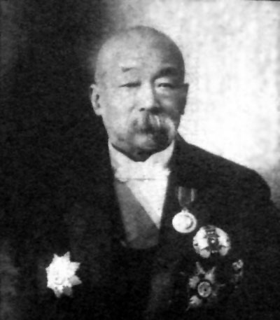 田文烈（1858年11月9日－1924年11月12日）字煥亭、煥廷、煥霆，晩號拙安老人。湖北漢陽新農鎮人，清末民初軍事將領、政治家，袁世凱的心腹。曾任北洋政府農商總長。